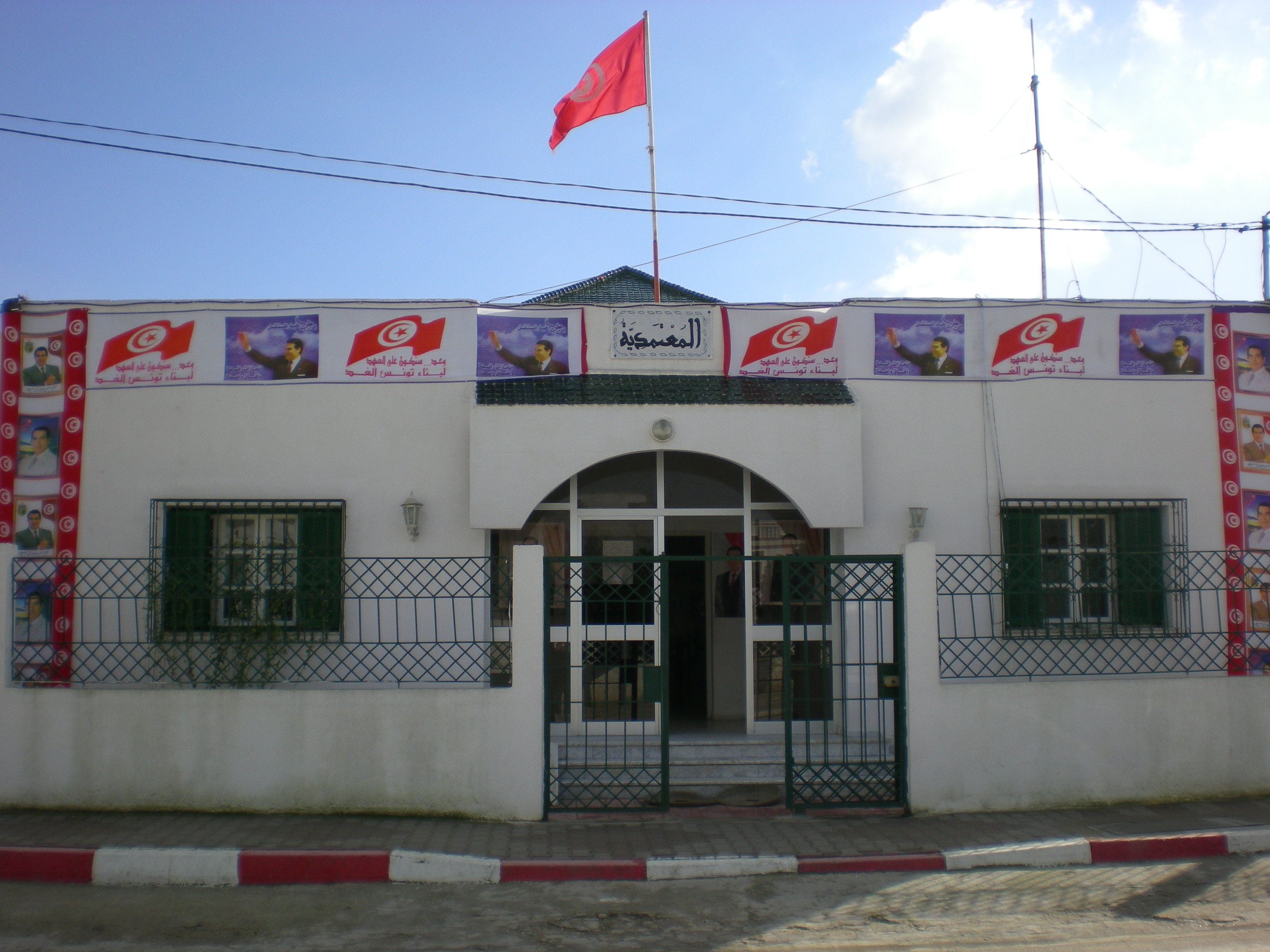 Siège de la Délégation de Kalâat el-Andalous, nord de la Tunisie